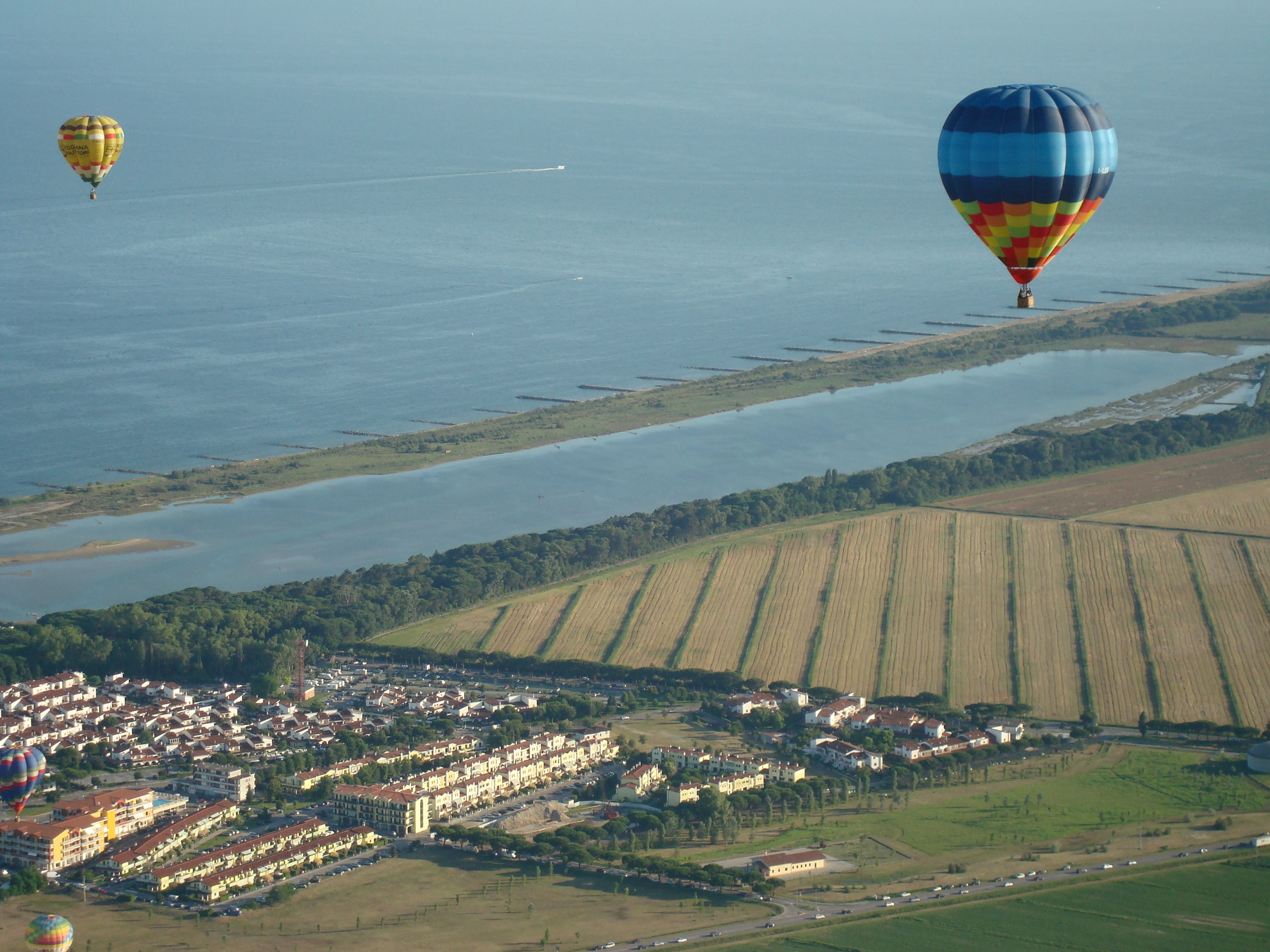 Foto della Laguna del Mort a Eraclea Mare vista dalla Mongolfiera a 200 metri di altezza.